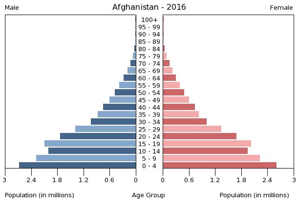 A population pyramid illustrates the age and sex structure of a country's population and may provide insights about political and social stability, as well as economic development. The population is distributed along the horizontal axis, with males shown on the left and females on the right. The male and female populations are broken down into 5-year age groups represented as horizontal bars along the vertical axis, with the youngest age groups at the bottom and the oldest at the top. The shape of the population pyramid gradually evolves over time based on fertility, mortality, and international migration trends.